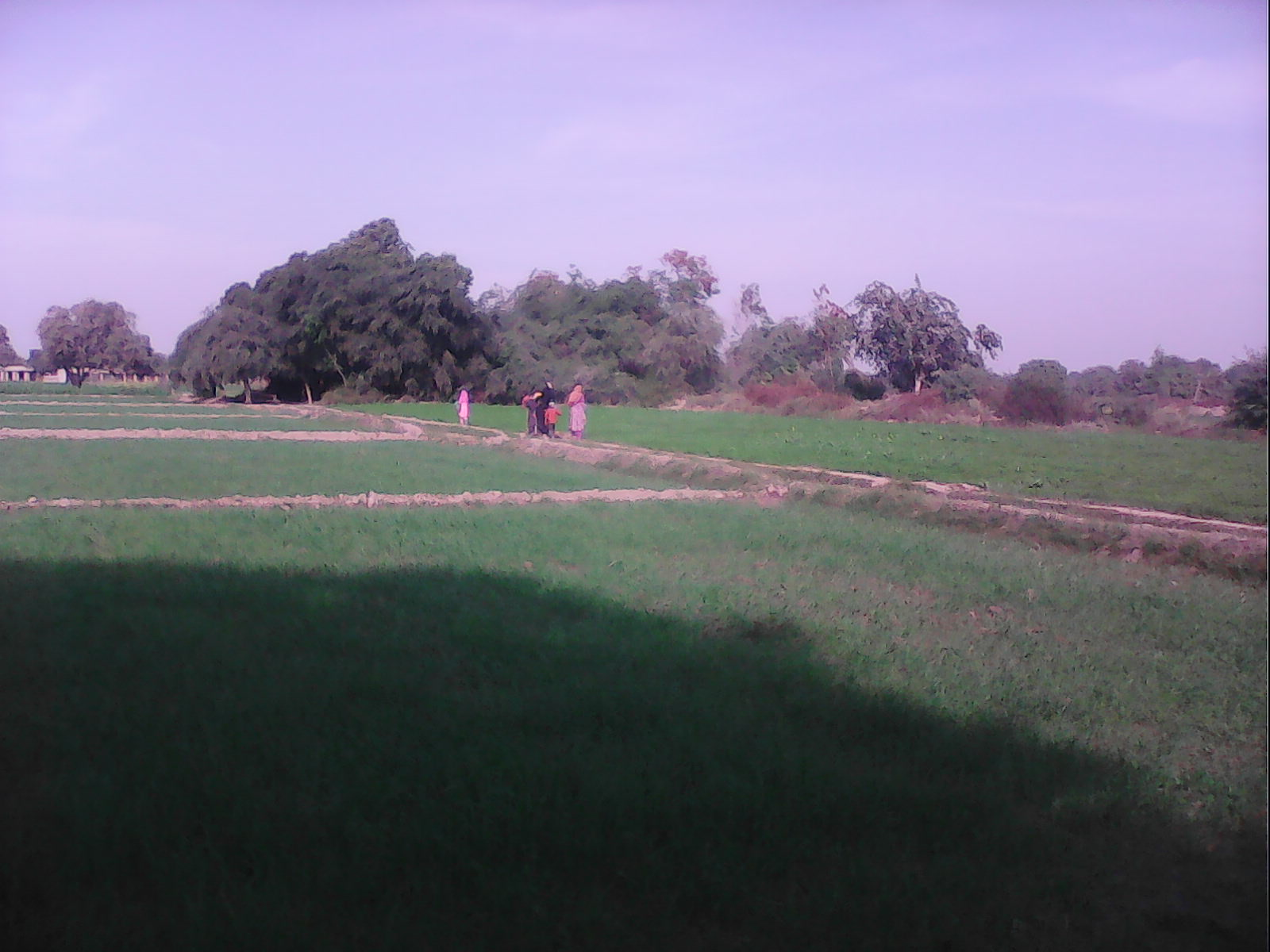 Аҧсшәа: مسن خاص1